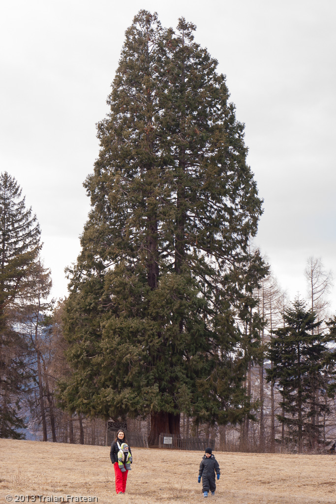 Sequoia la Vladeasa